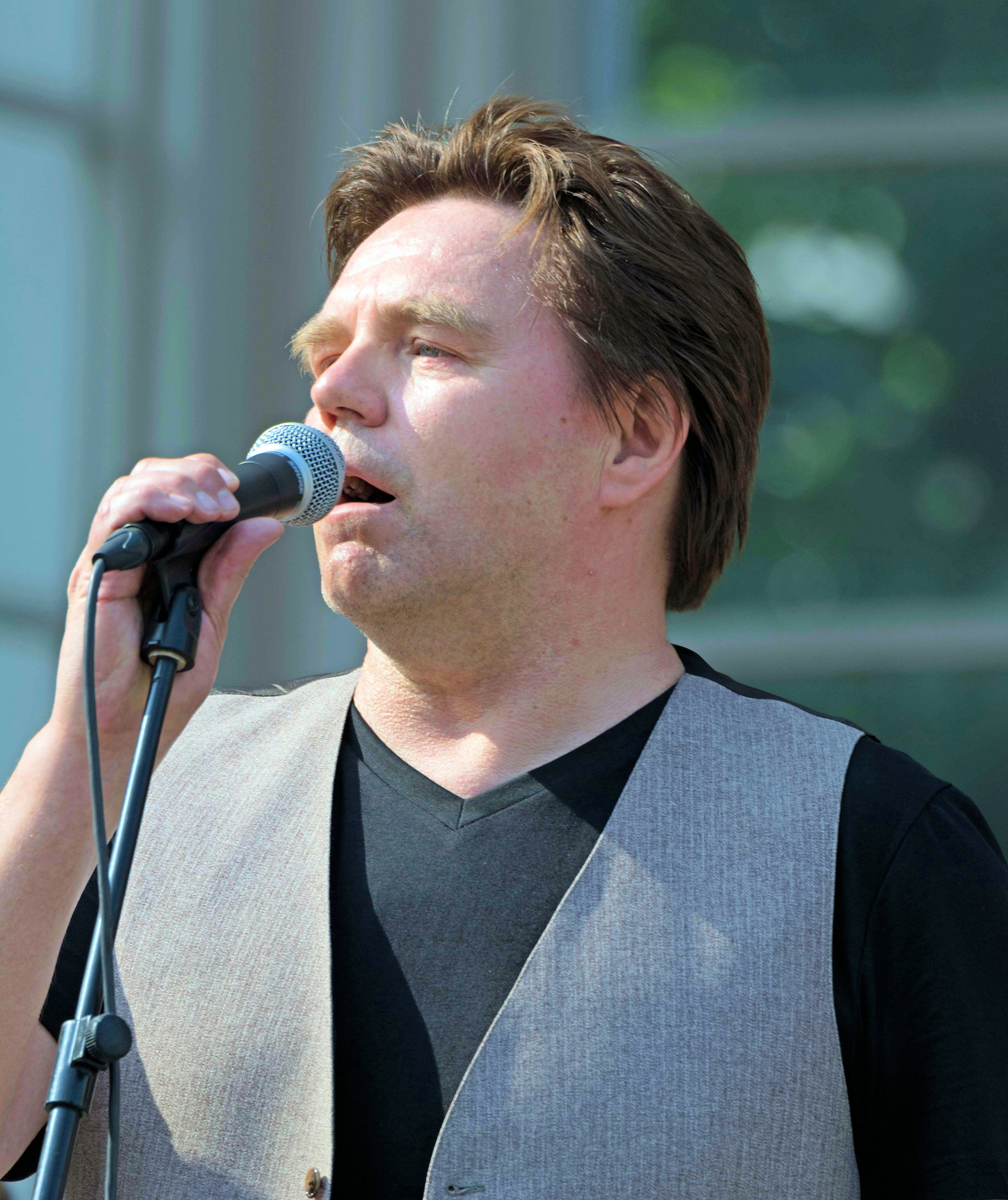 Timo Turpeinen suomalainen laulaja